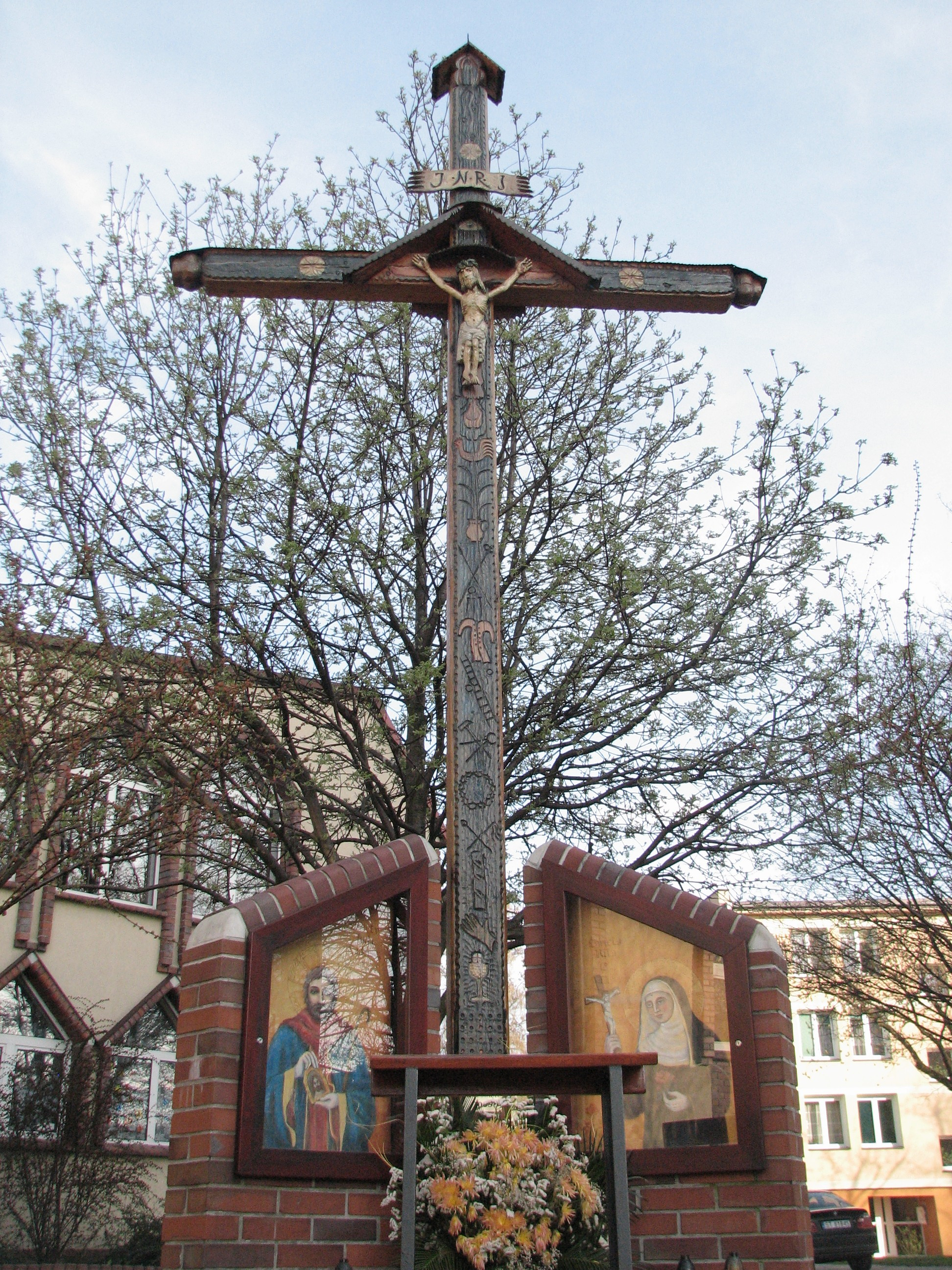 krzyż misyjny obok parafii św. Rodziny w Tychach